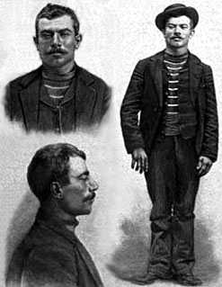 Imagens de Luig Lucheni